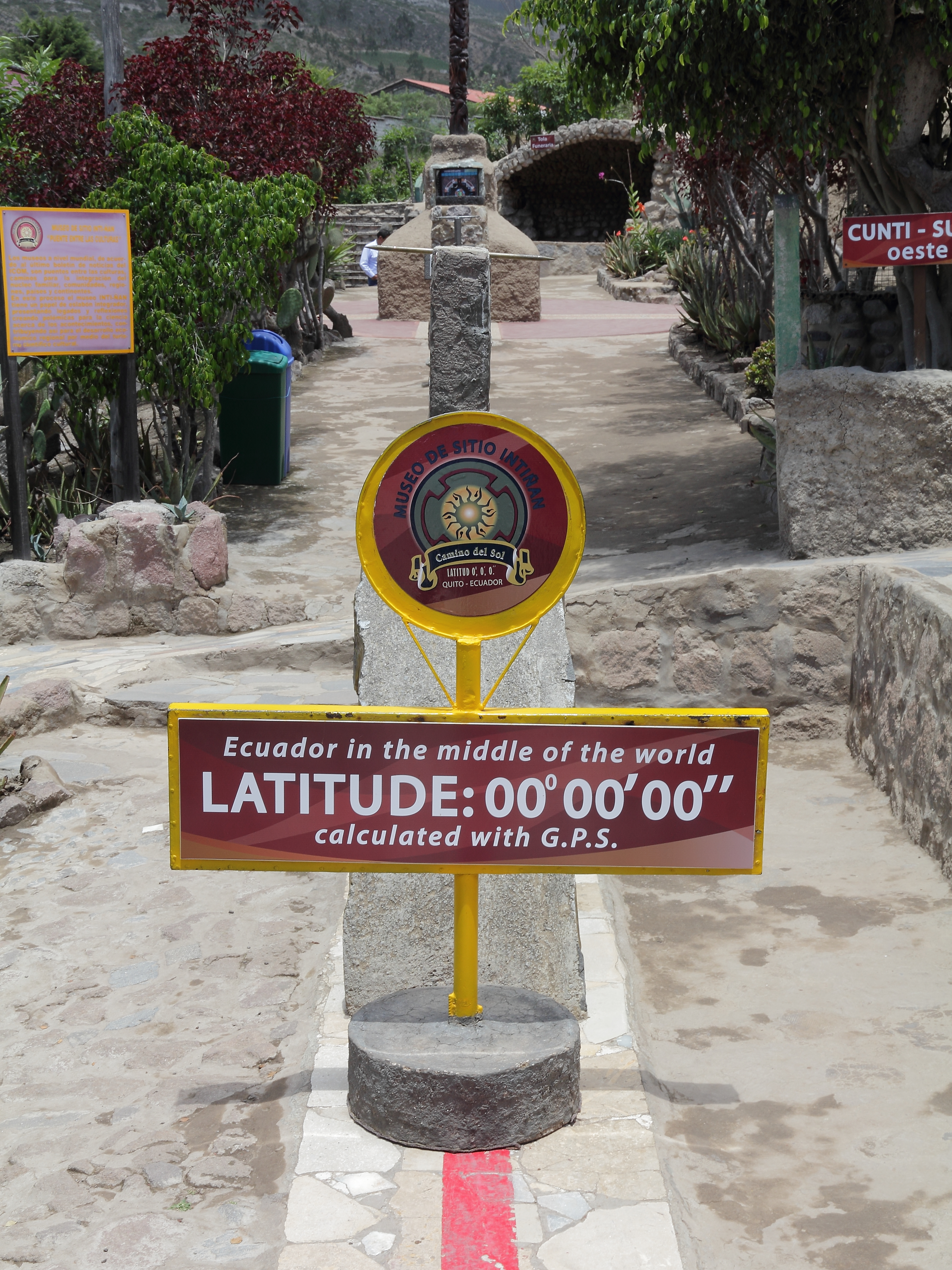 Intiñan Solar Museum i provinsen Pichincha, Ecuador.